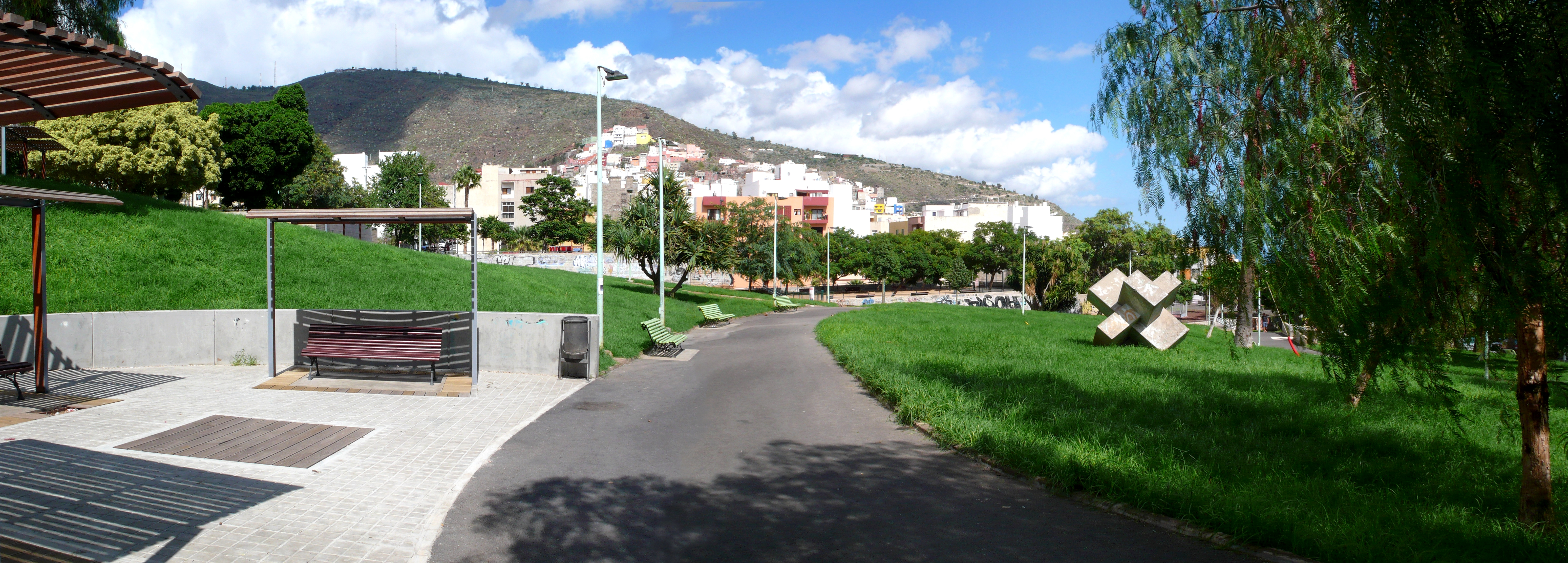 Panorámica del Parque de Las Indias, Santa Cruz de Tenerife. A la derecha d ela imagen se pued ever la escultura Macla de Eduardo Gregorio.